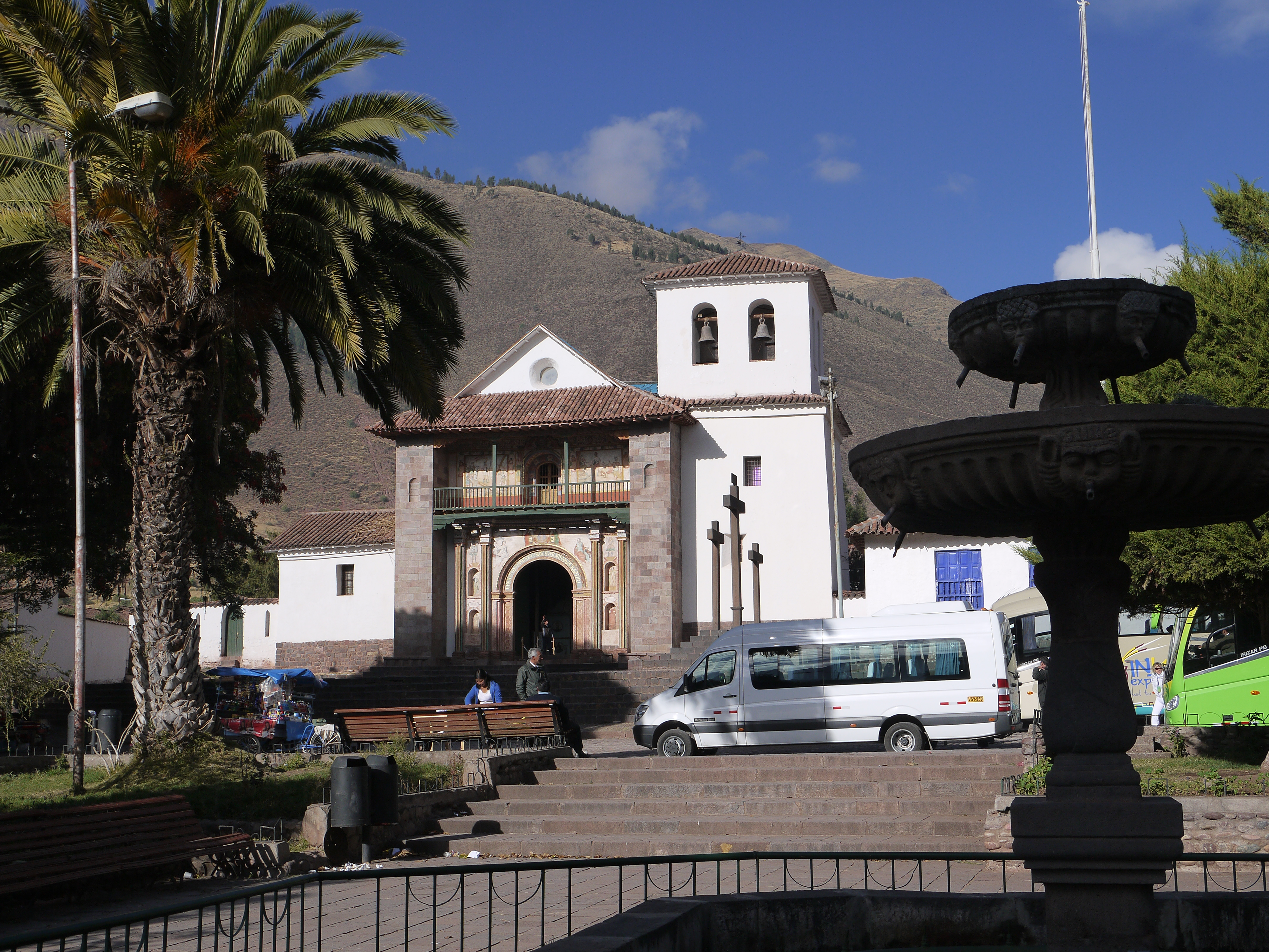 Place du village d'Andahuaylillas